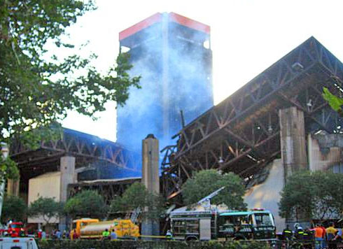 Ruinas del Edificio Diego Portales, Santiago